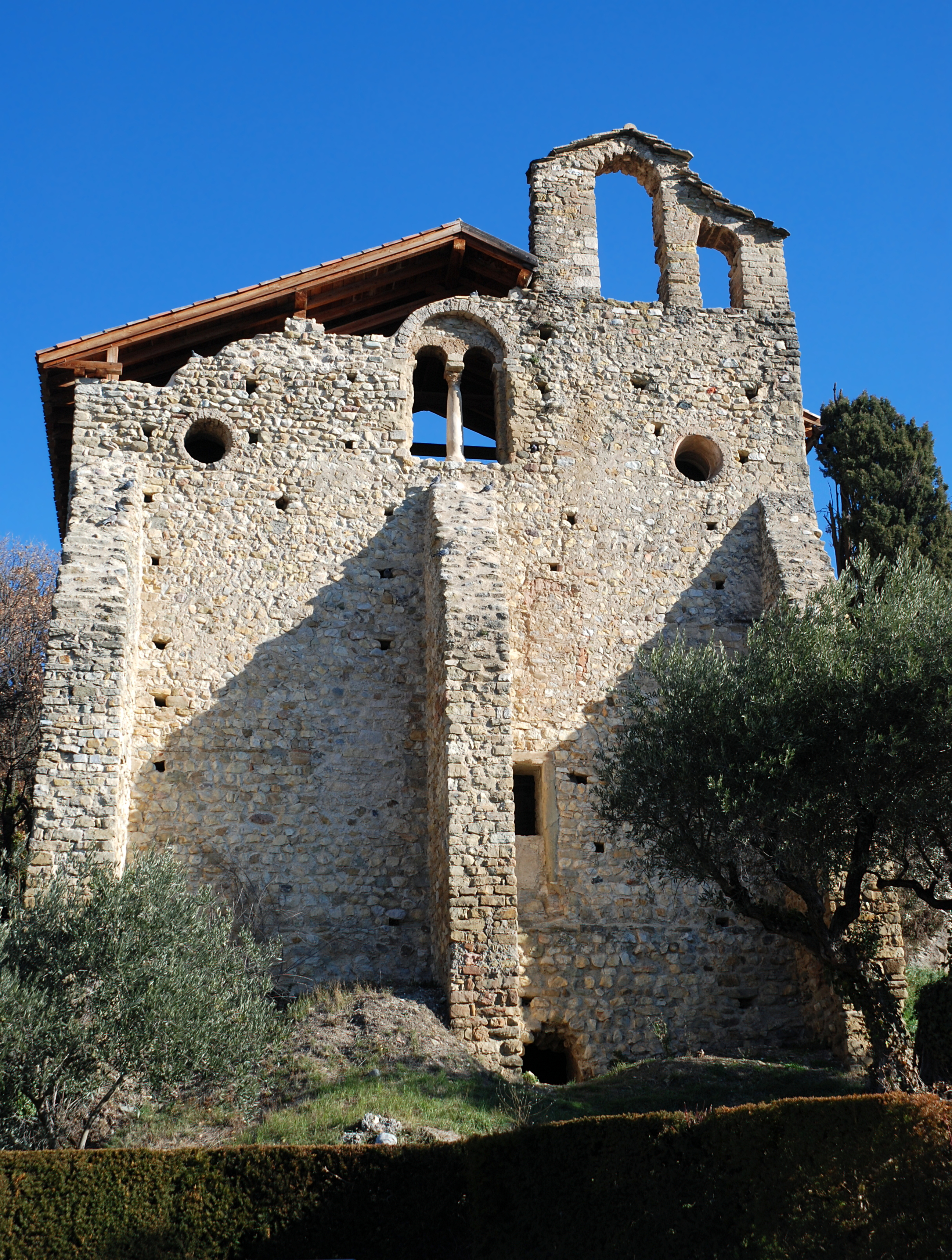 France - Provence - Église Saint-Martin de Volonne